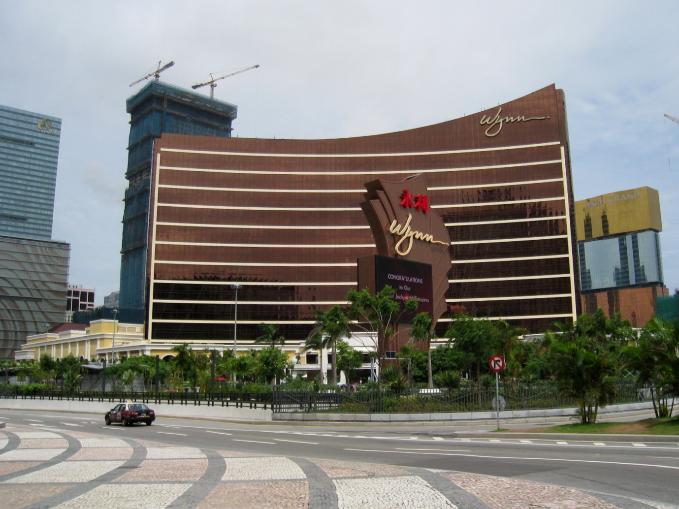 Wynn Macau Resort